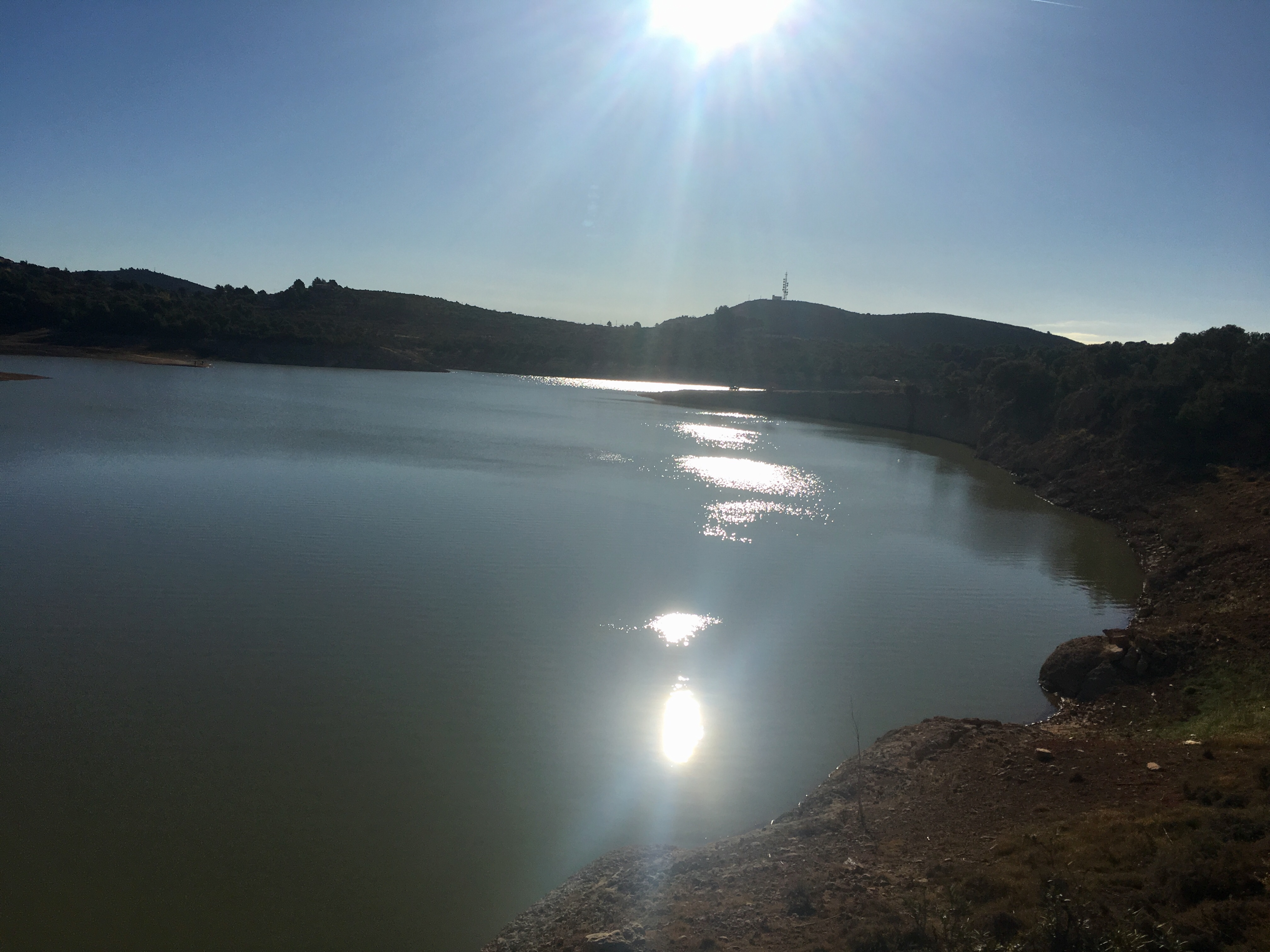 En esta imagen podemos ver como la cantidad de agua del pantano ha variado durante los años.